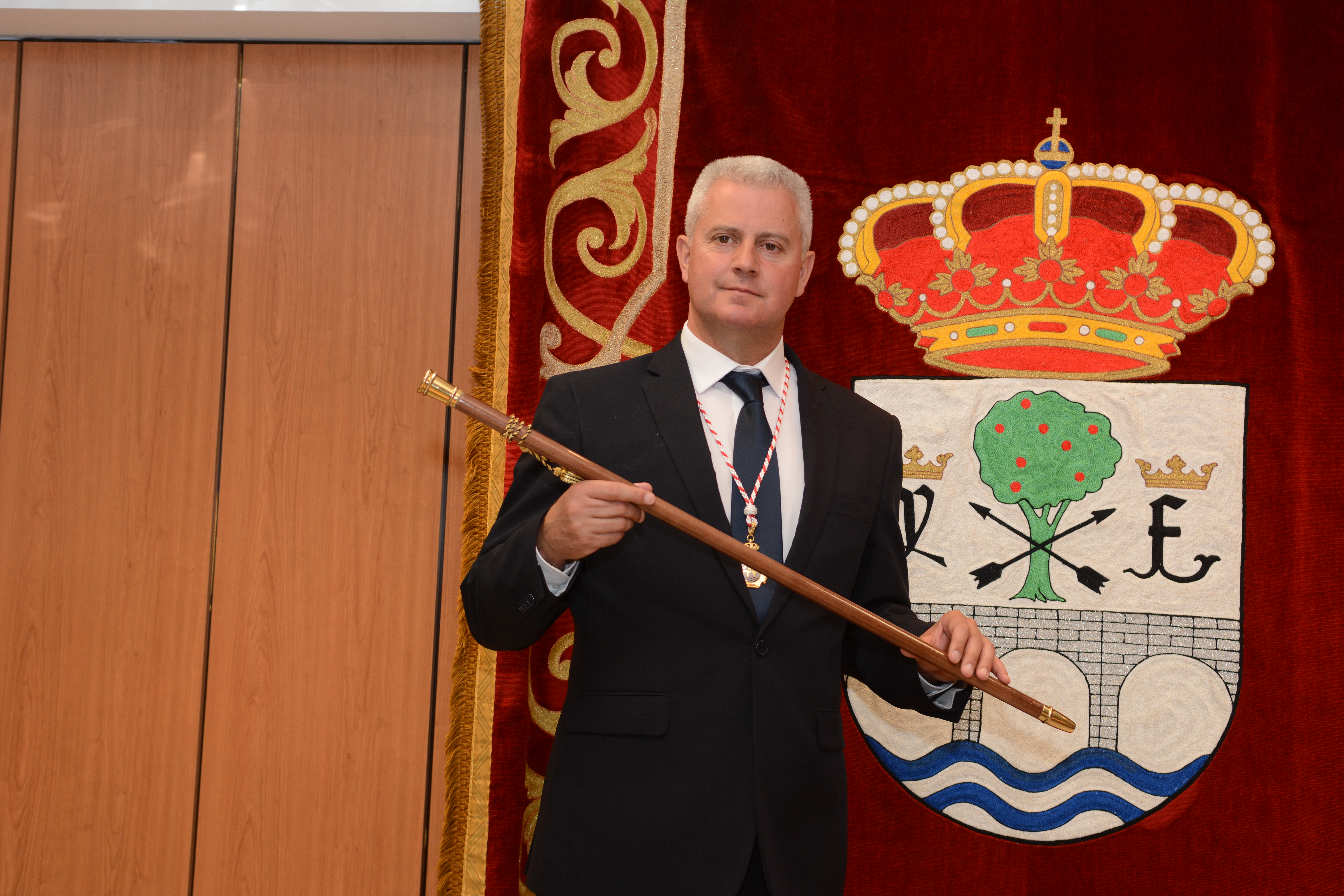 Narciso Romero, proclamado alcalde de San Sebastián de los Reyes.